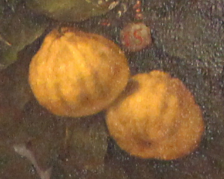 Villa medicea di Poggio a Caiano - MIBAC The making of this document was supported by Wikimedia CH. (Submit your project!) For all the files concerned, please see the category Supported by Wikimedia CH. This is a photo of a monument which is part of cultural heritage of Italy.